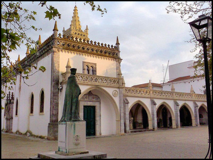 Façade of the Conceição Convent in Beja, Portugal